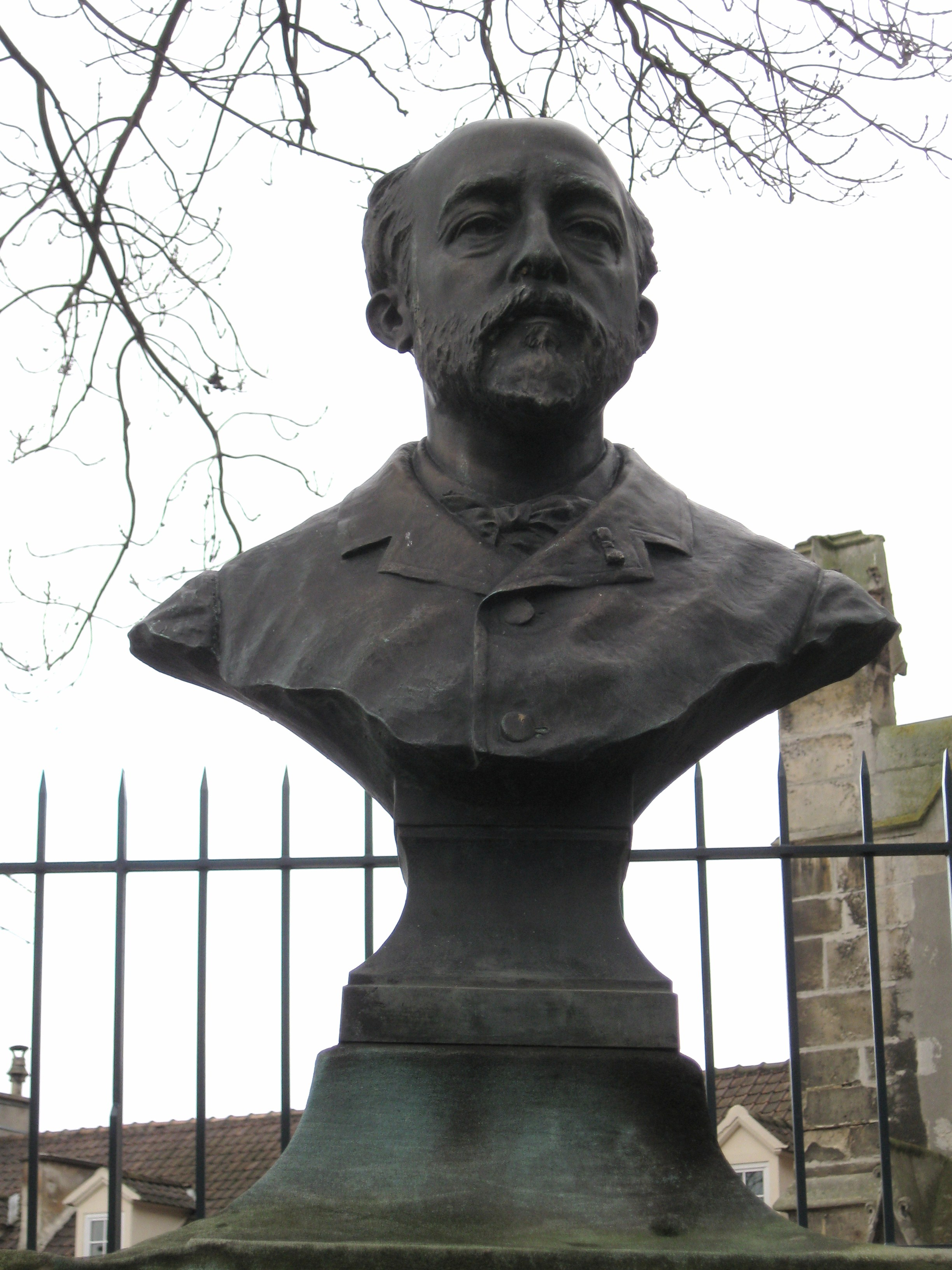 Buste de Paul Arène (1843-1896) dans le Jardin des Félibres, Sceaux, Hauts-de-Seine, France